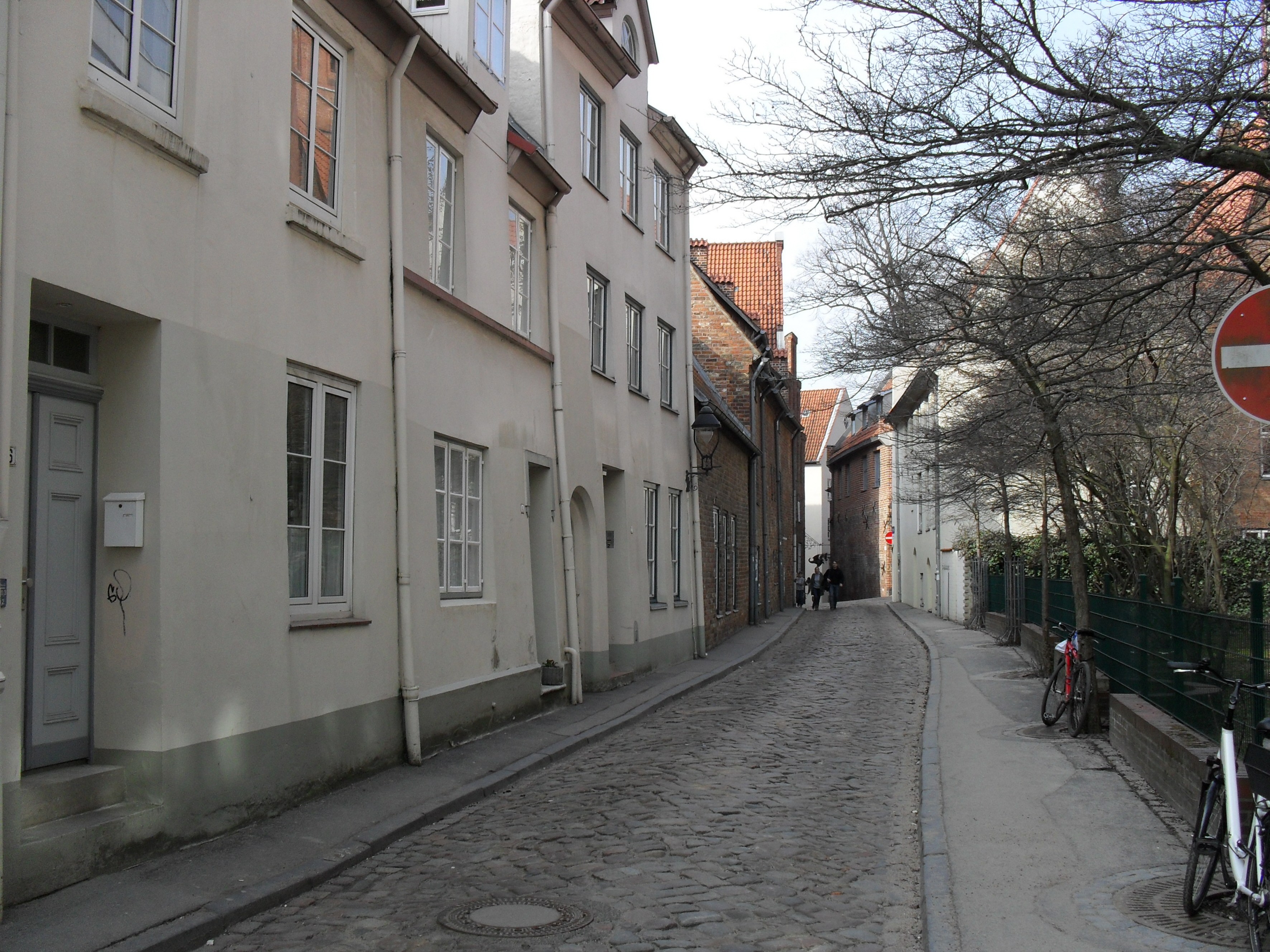 Die Kleine Kiesau in Lübeck